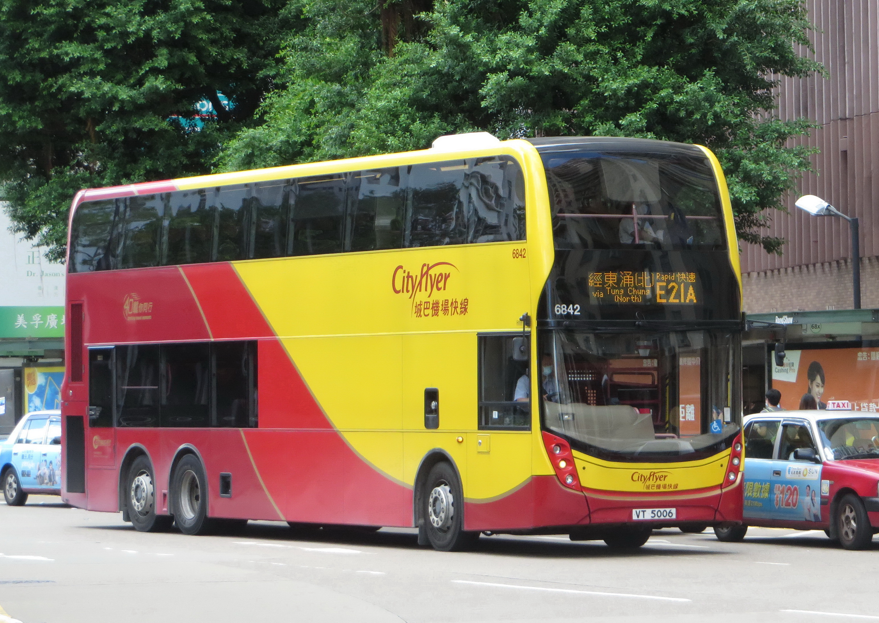 中文（香港）: Trident E500 Turbo 6842